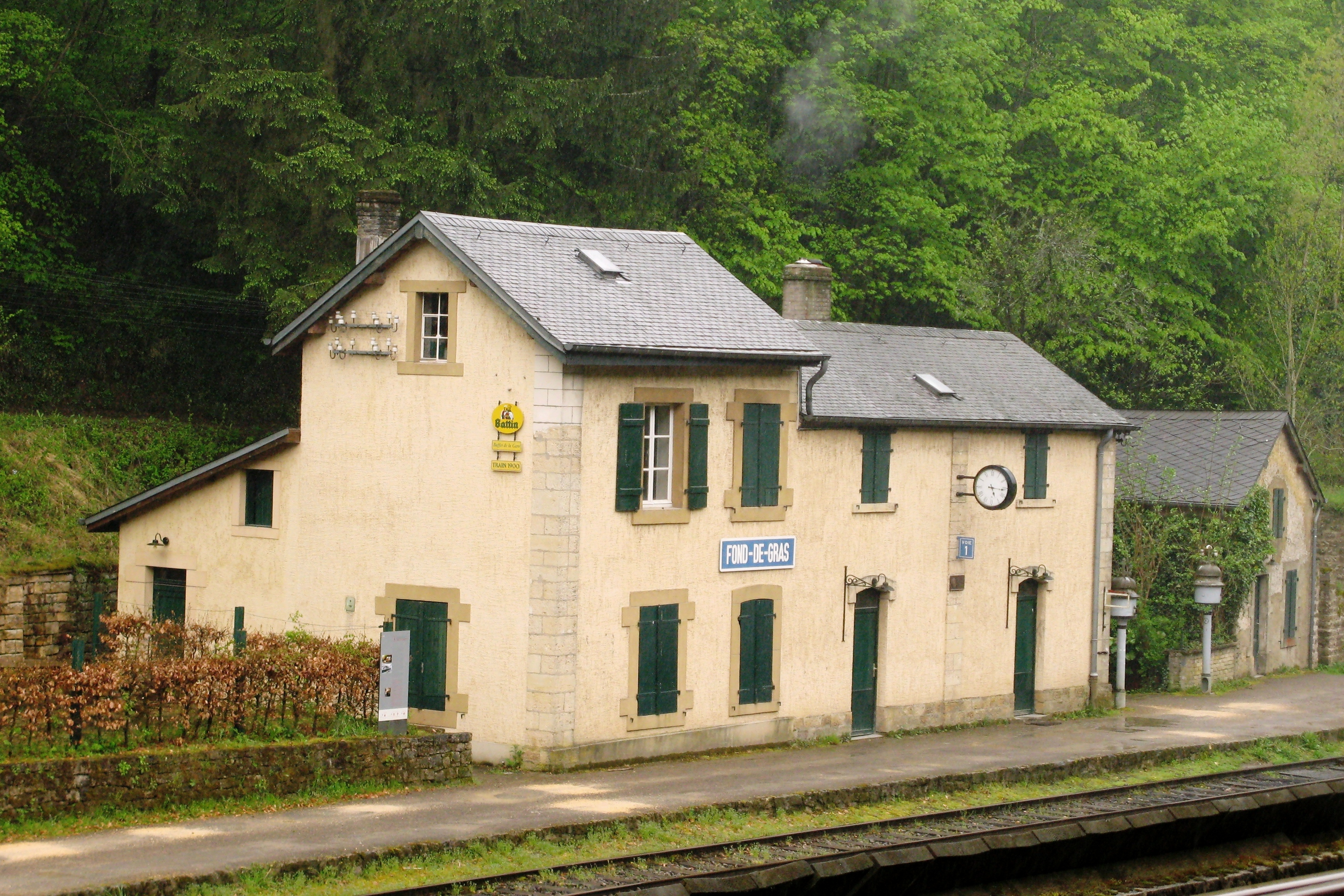 Gare am Fond-de-Gras.